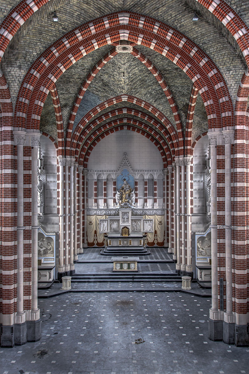 Overzichtsfoto klooster kerk Gerkensberg vanaf het tabernakel.